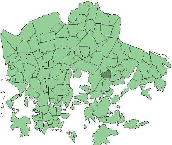 Districts of Helsinki, Roihupellon teollisuusalue highlighted